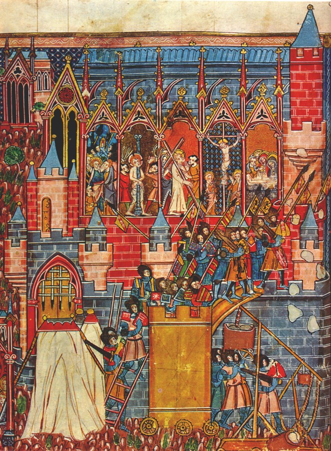 Guillaume de Tyr, Historia, BNF ms FR 352 fol. 62""